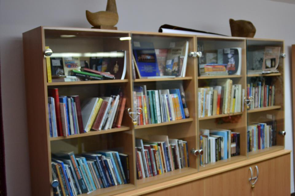 Билбиотека